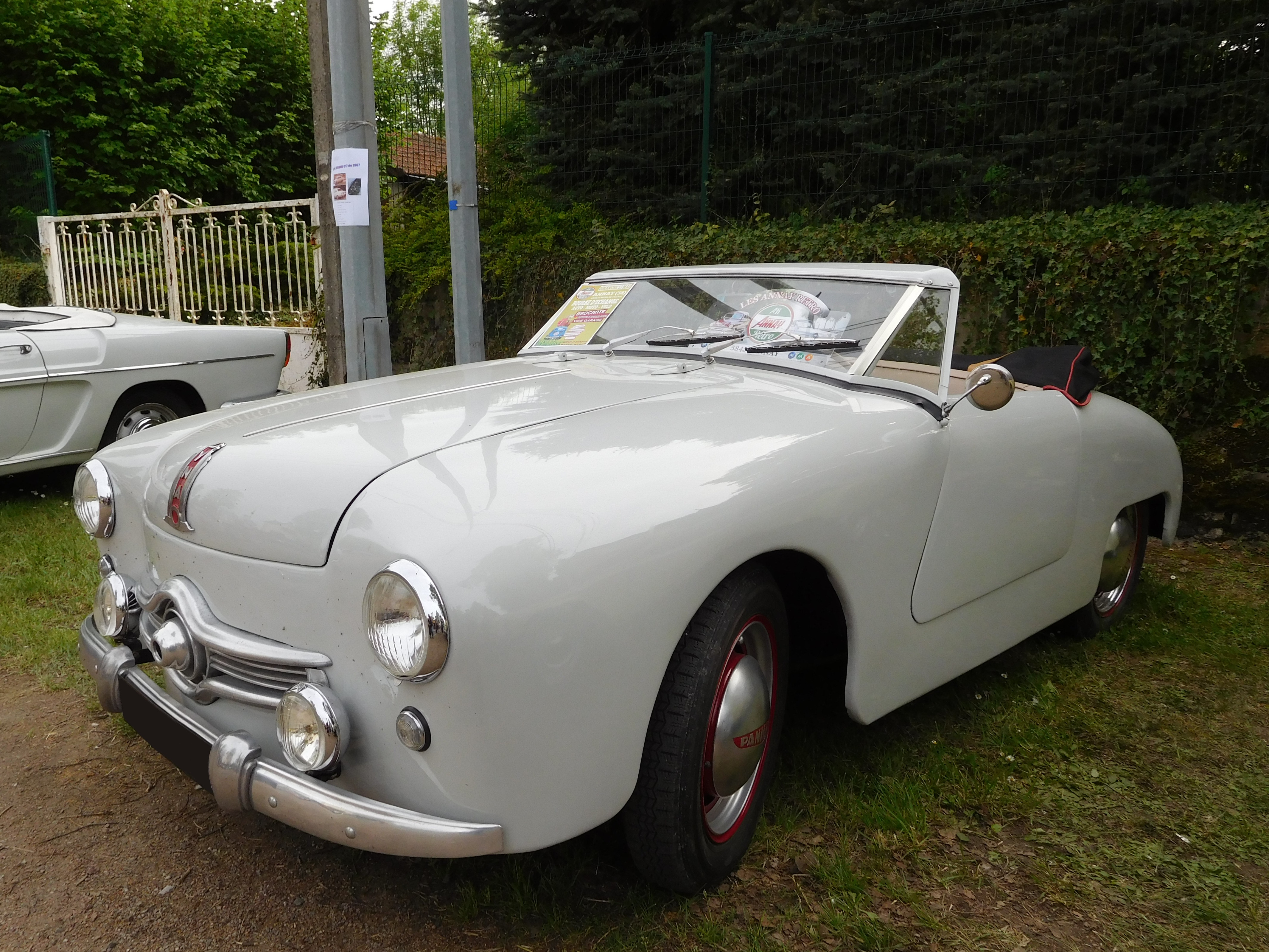 Panhard Dyna X cabriolet.